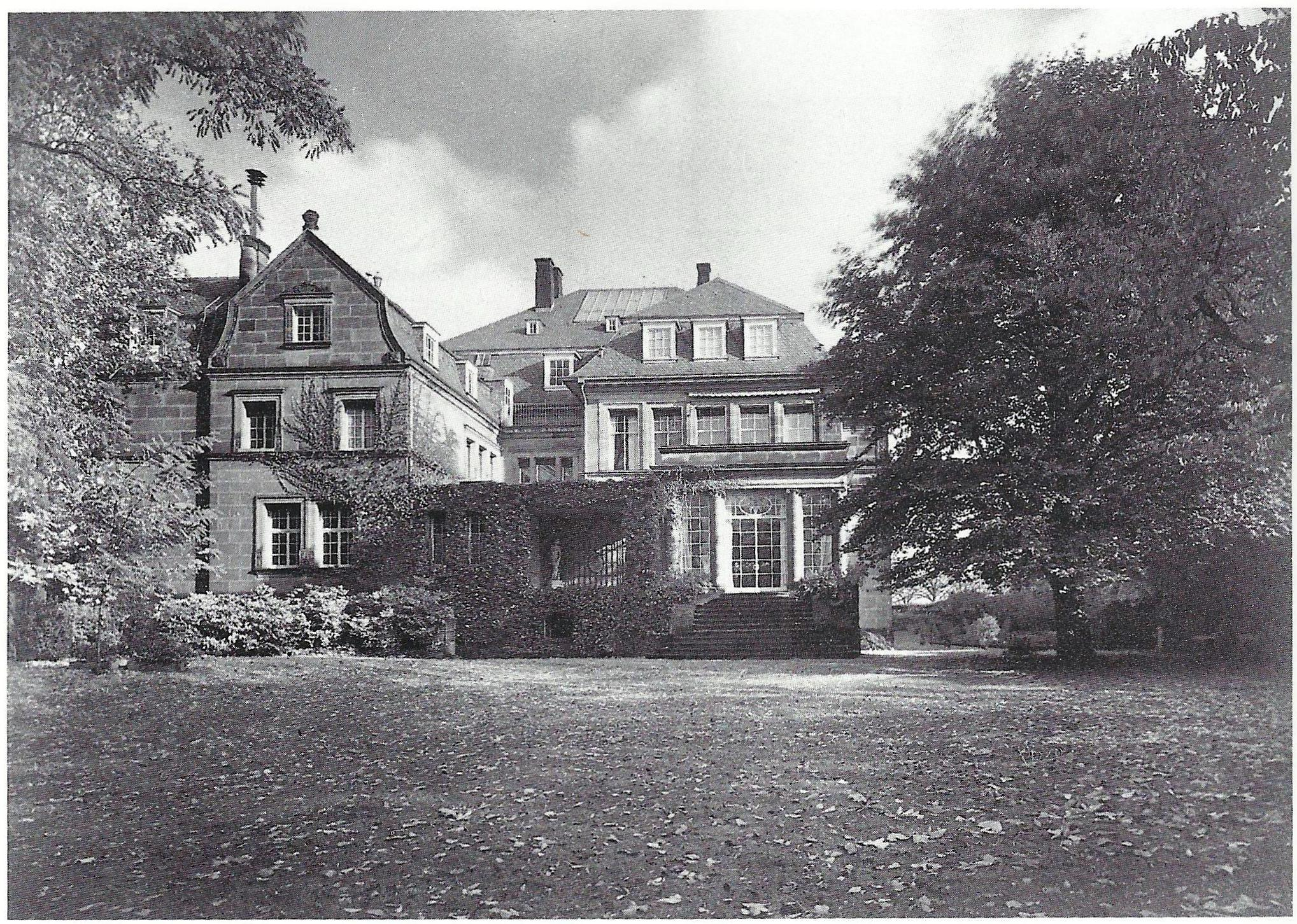 Villa Lindgens (1958 abgebrochen), Gustav-Heinemann-Ufer 130, Köln-Bayenthal: Straßenansicht